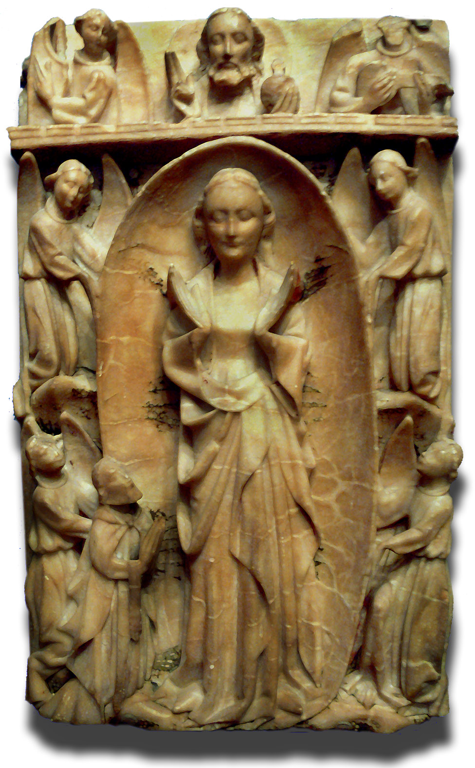 Retable en Albâtre, XVème sicèle, Grande-Bretagne. Photographié lors de l'Exposition : Celtes et Scandinaves, rencontres artistiques, VIIe-XIIe siècle, 1er octobre 2008 - 12 janvier 2009, Musée national du moyen-âge - thermes et hôtel de Cluny (photographie autorisée dans le musée et l'exposition, avec une restriction : sans flash).